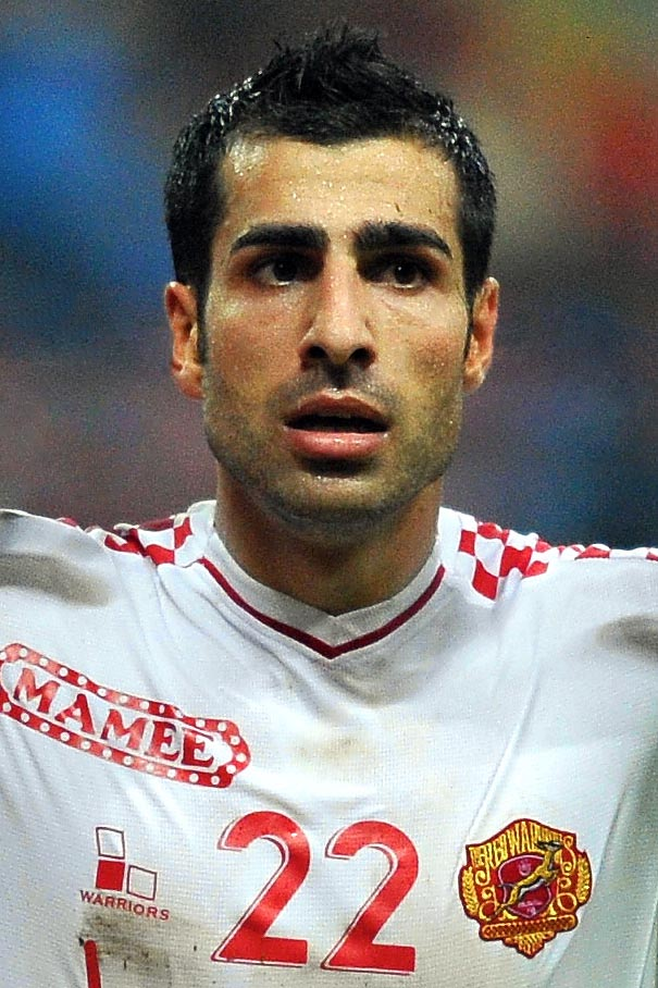 Mohammed Ghaddar - Malaysia Cup 2012 semi-finals Kelantan VS Selangor